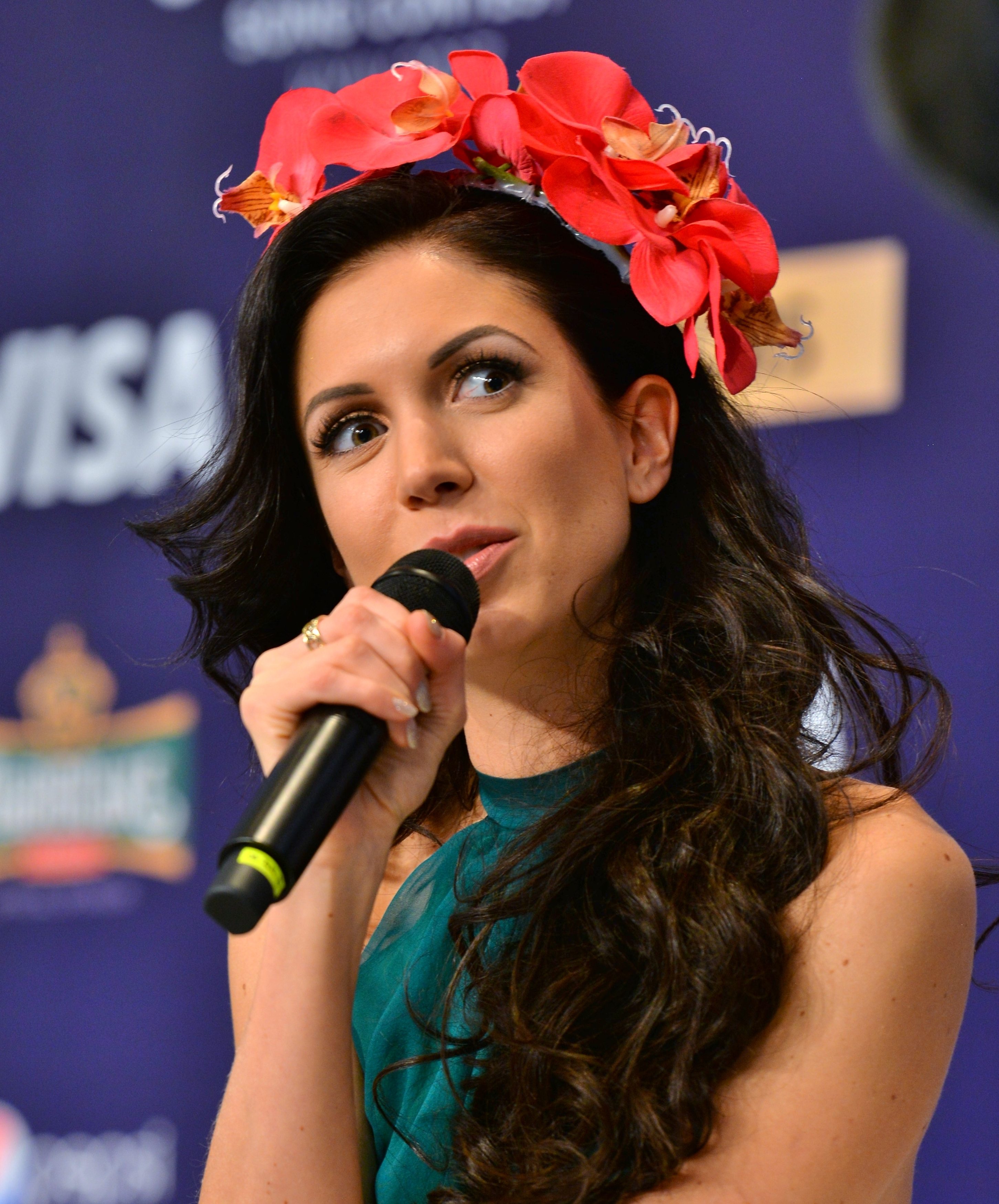 Естонська співачка Лаура Пильдвере на прес-конференції пісенного конкурсу Євробачення 2017 у Києві